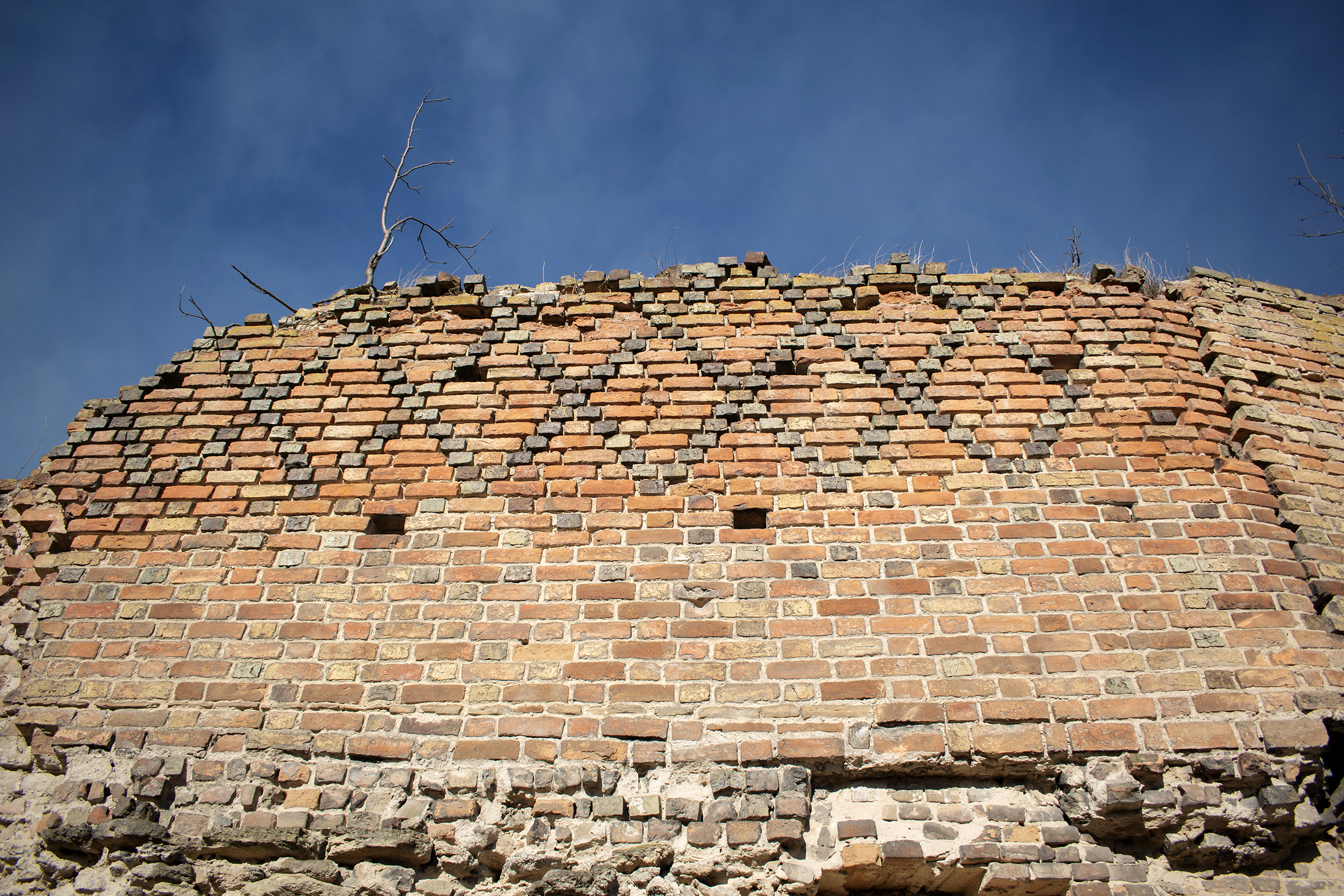 Орнаментна кладка фрагменту окольного замку в Луцьку